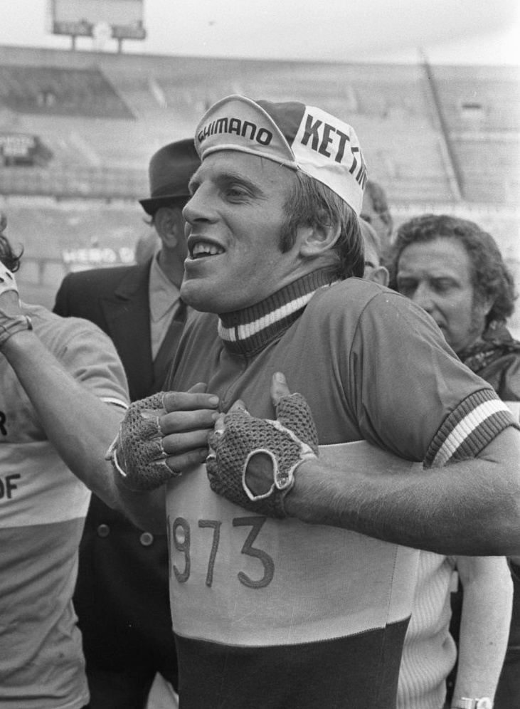 Cees Stam